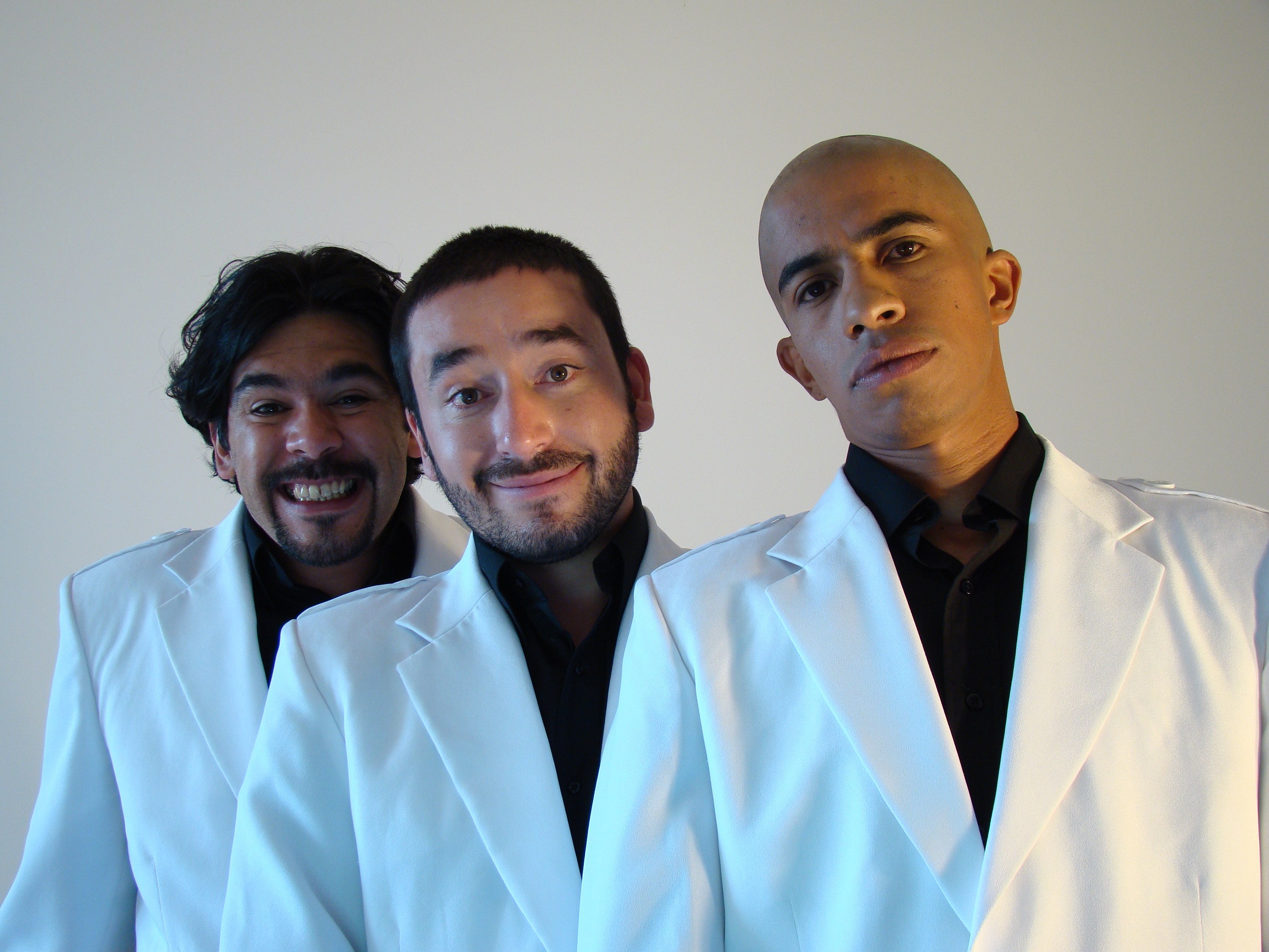 Fotografía de los comediantes de Pasus3 en el 2010, de izquierda a derecha: Juan Buenaventura, Julián Beltrán y Anibal Baeza